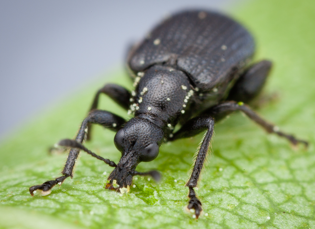 Deporaus betulae